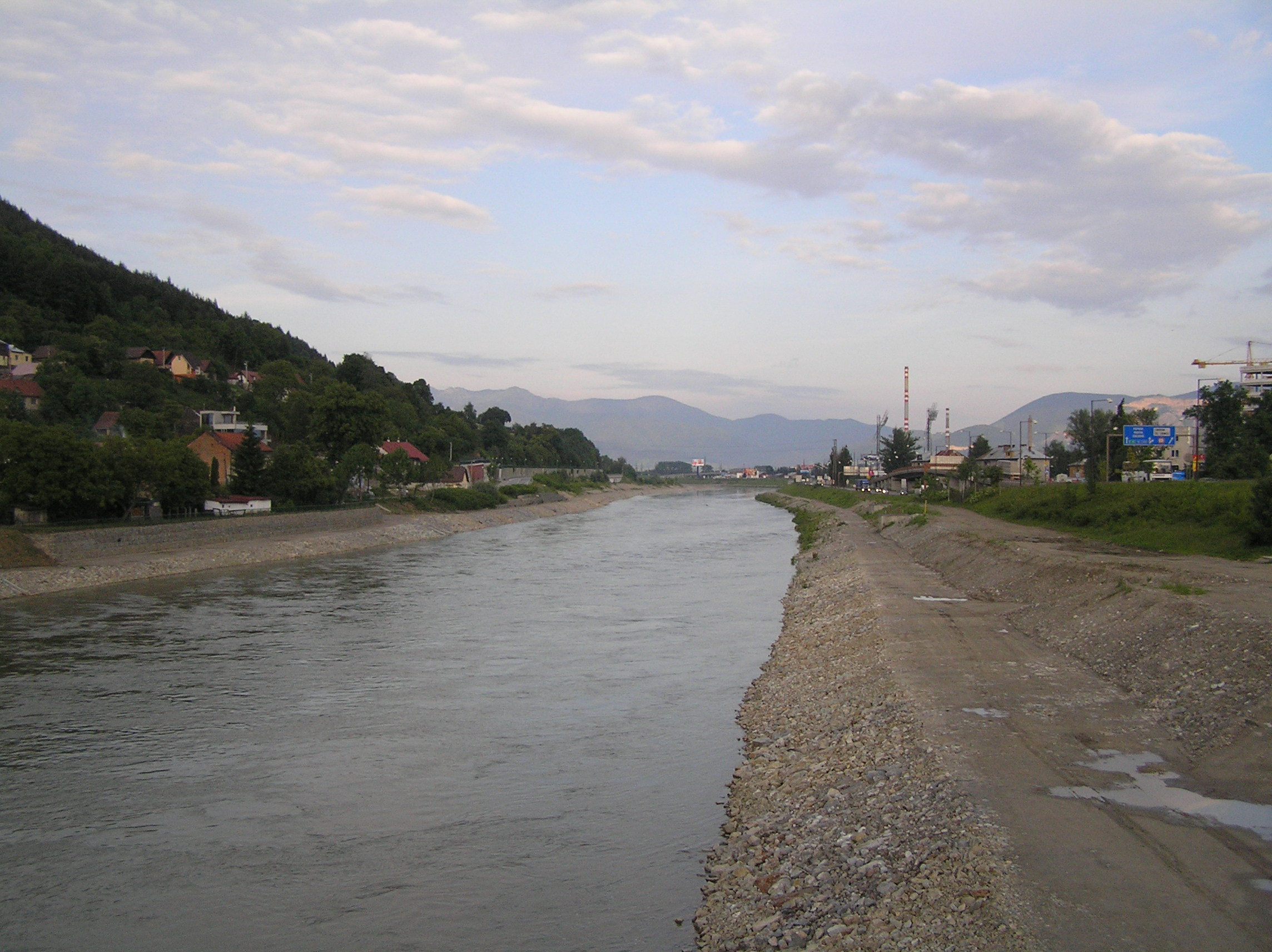 Koryto rieky Váh neďaleko mosta, Žilina